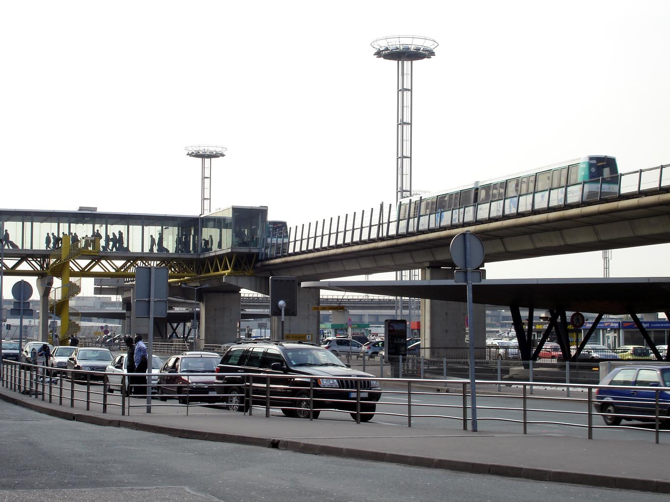 Orlyval, station départs Orly-Sud